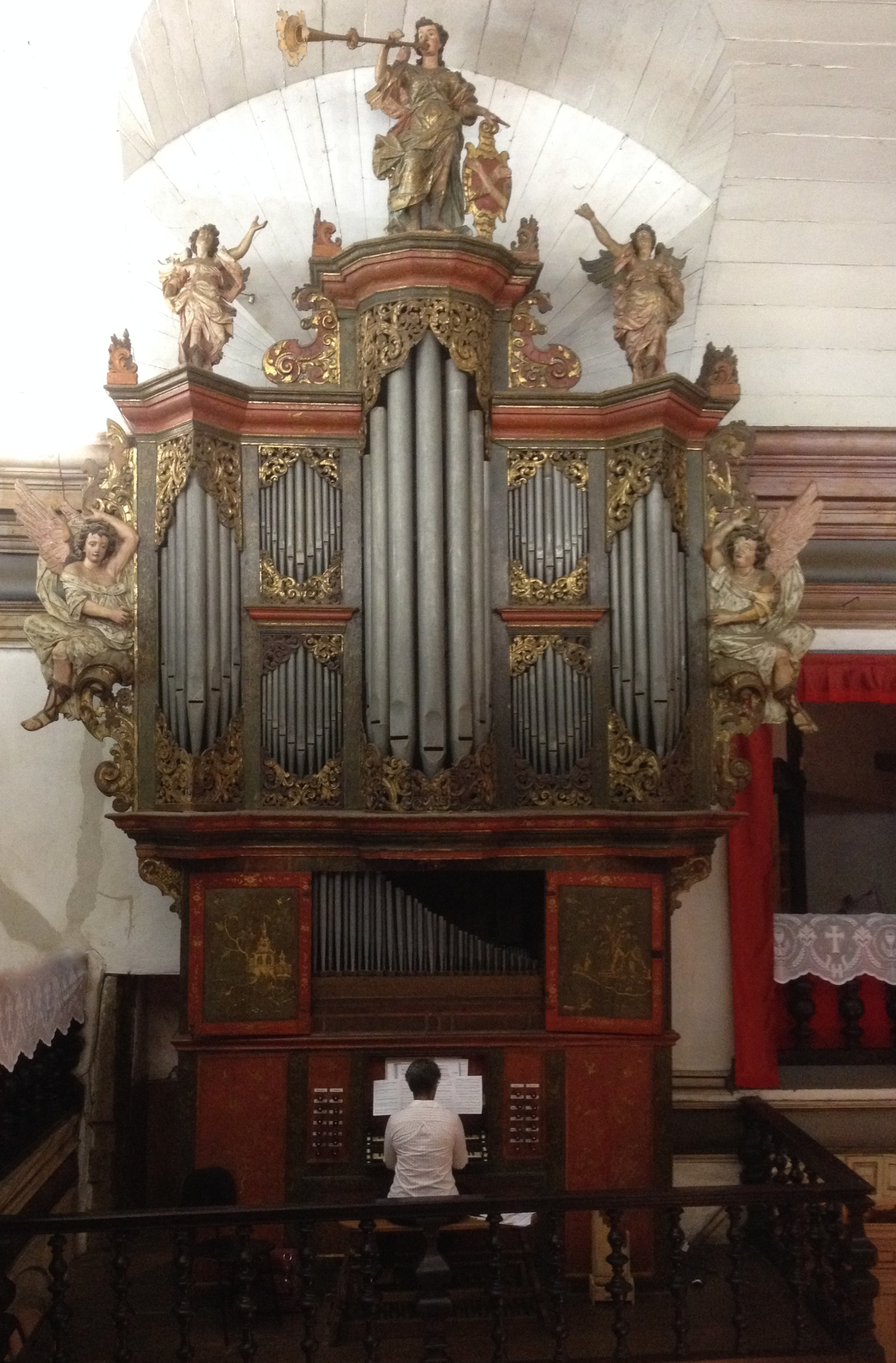 Órgão da Catedral de Mariana tocado por Josinéia Godinho